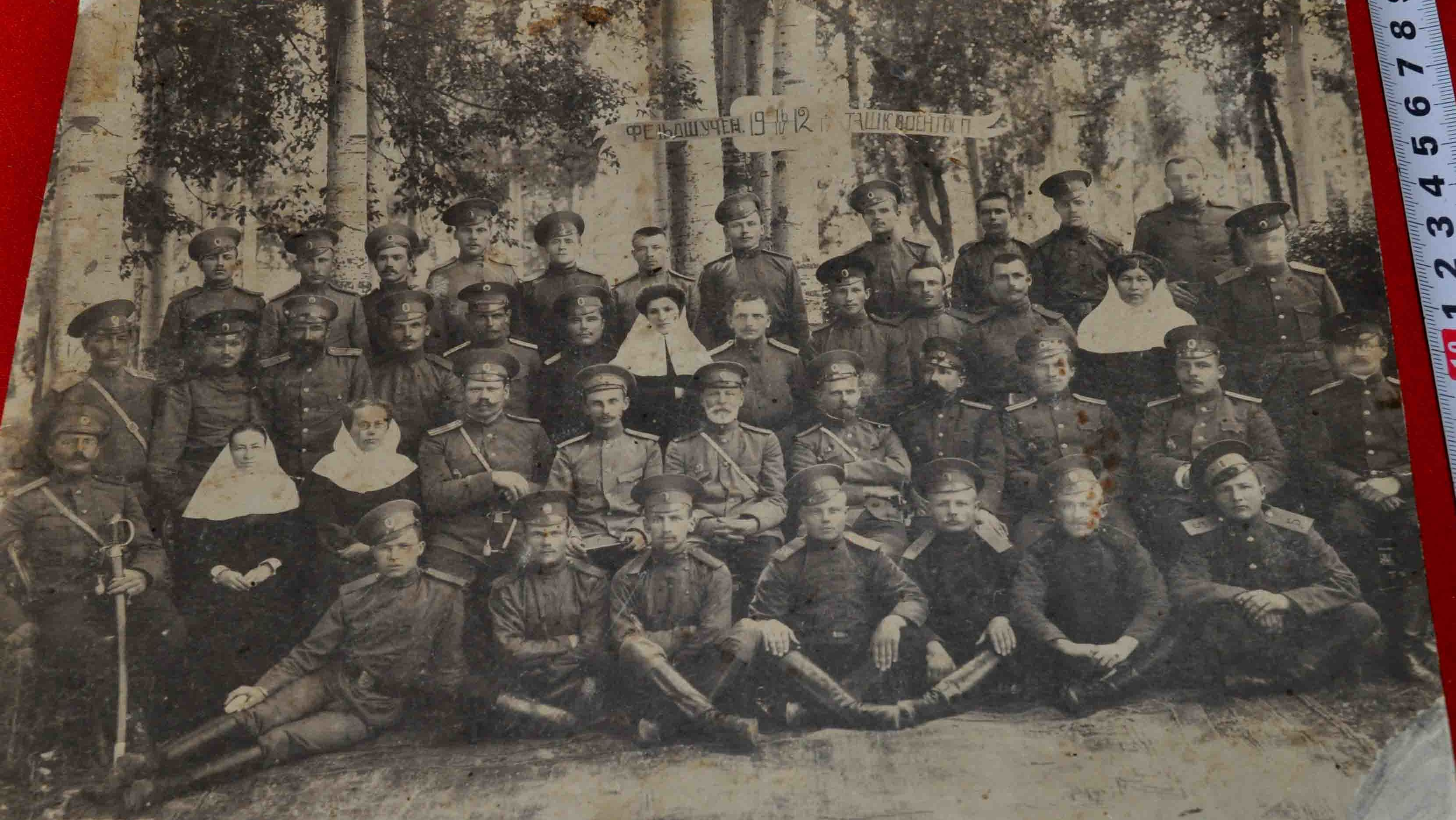 Фельдшерские учения Ташкентского военного госпиталя. 16 апреля 1912 года (фотография сделана под углом)